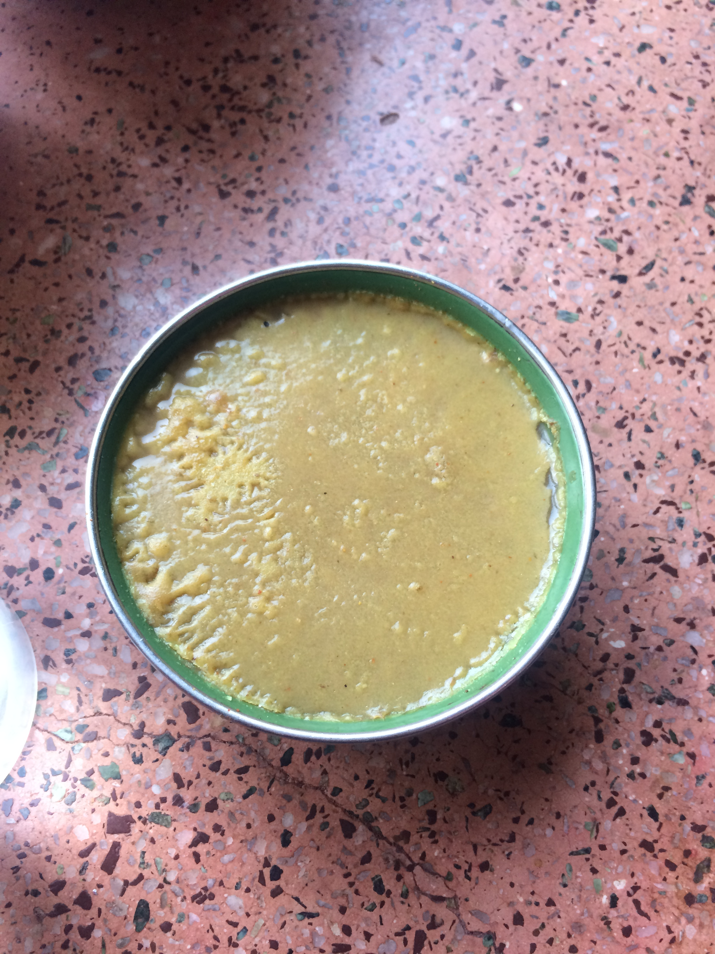 नेपाली: तखा परिकार